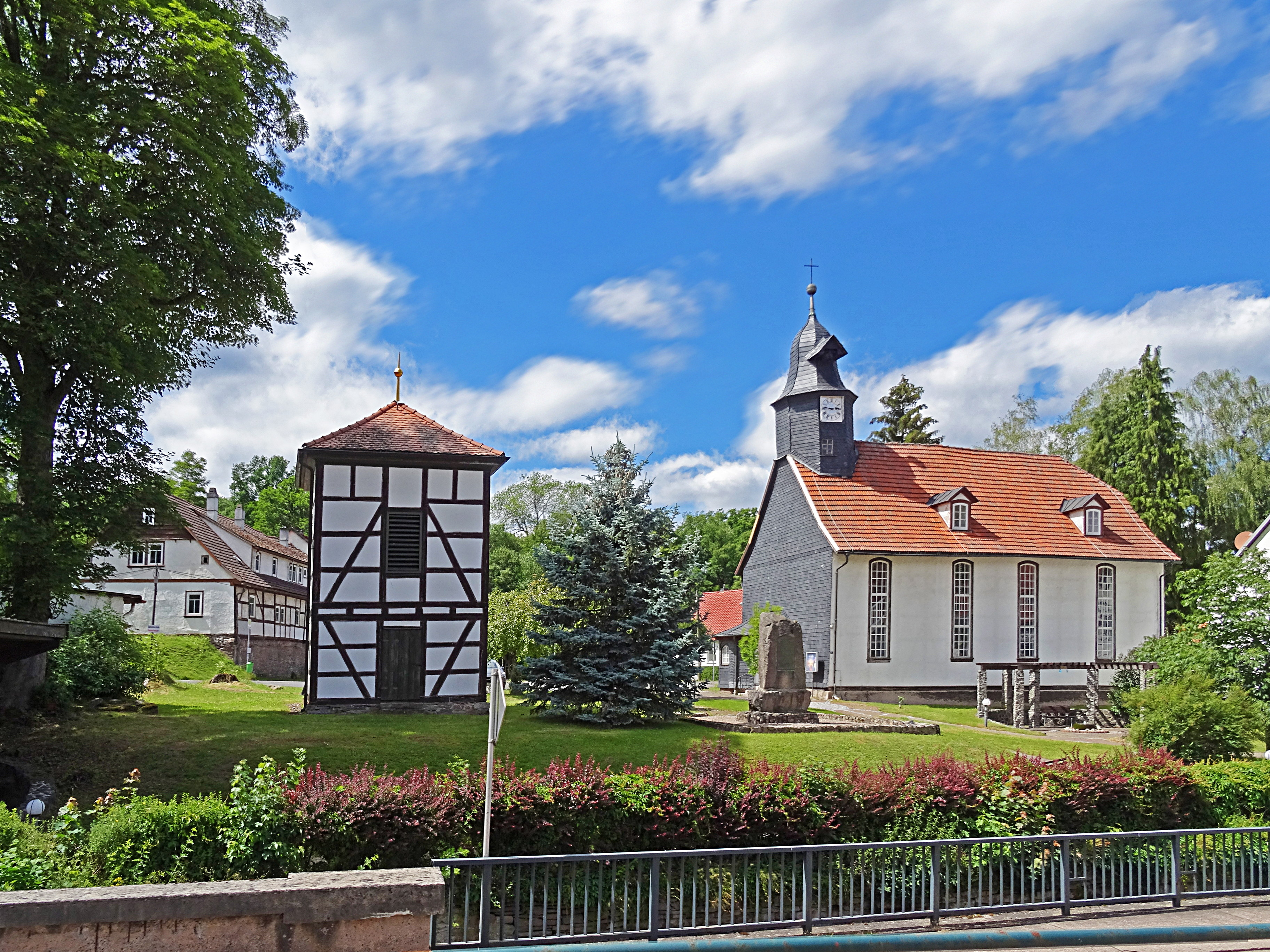 St.-Johannis-Kirche (Winterstein) von Osten